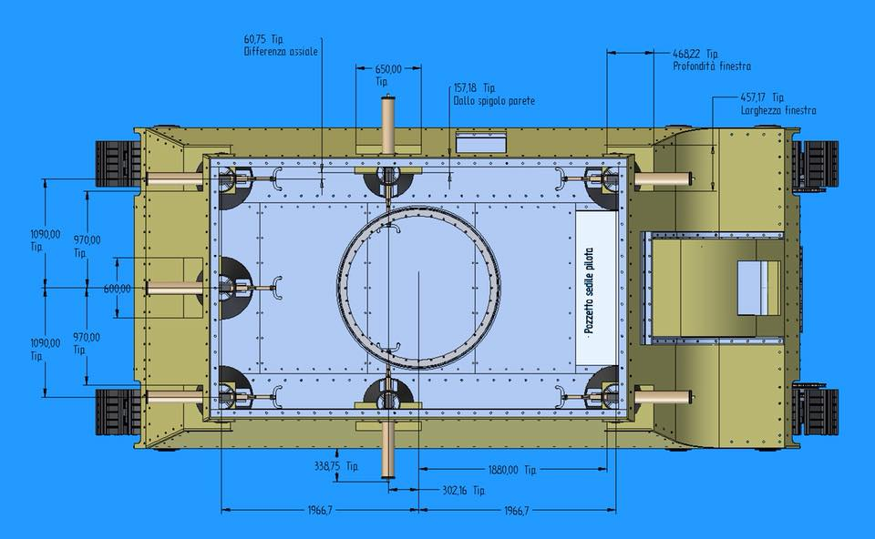 Schemaf2000